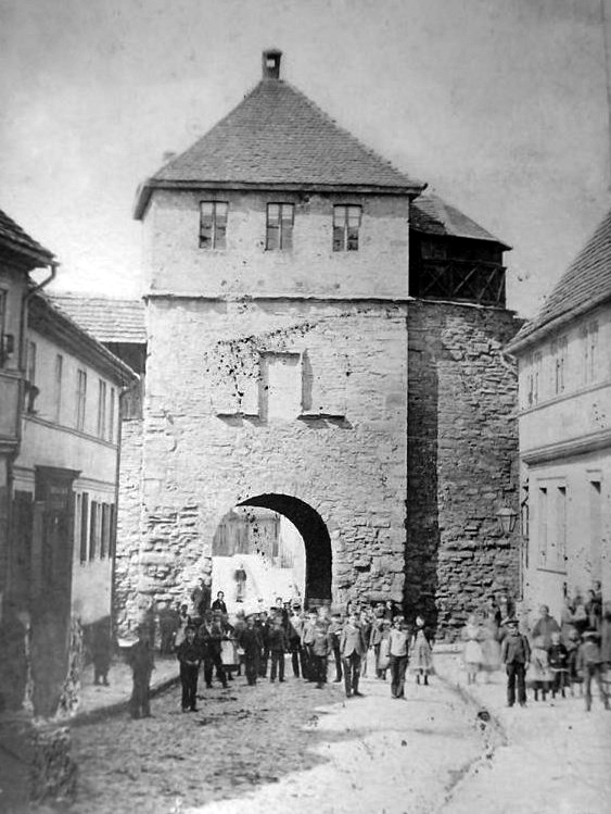 Altes Göpentor Sangerhausen, abgebrochen 1880, antike Photographie, vor 1880.